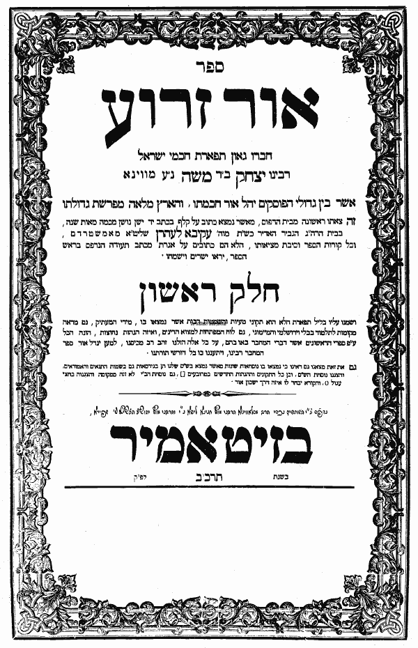 תצלום עמוד השער של ספר אור זרוע